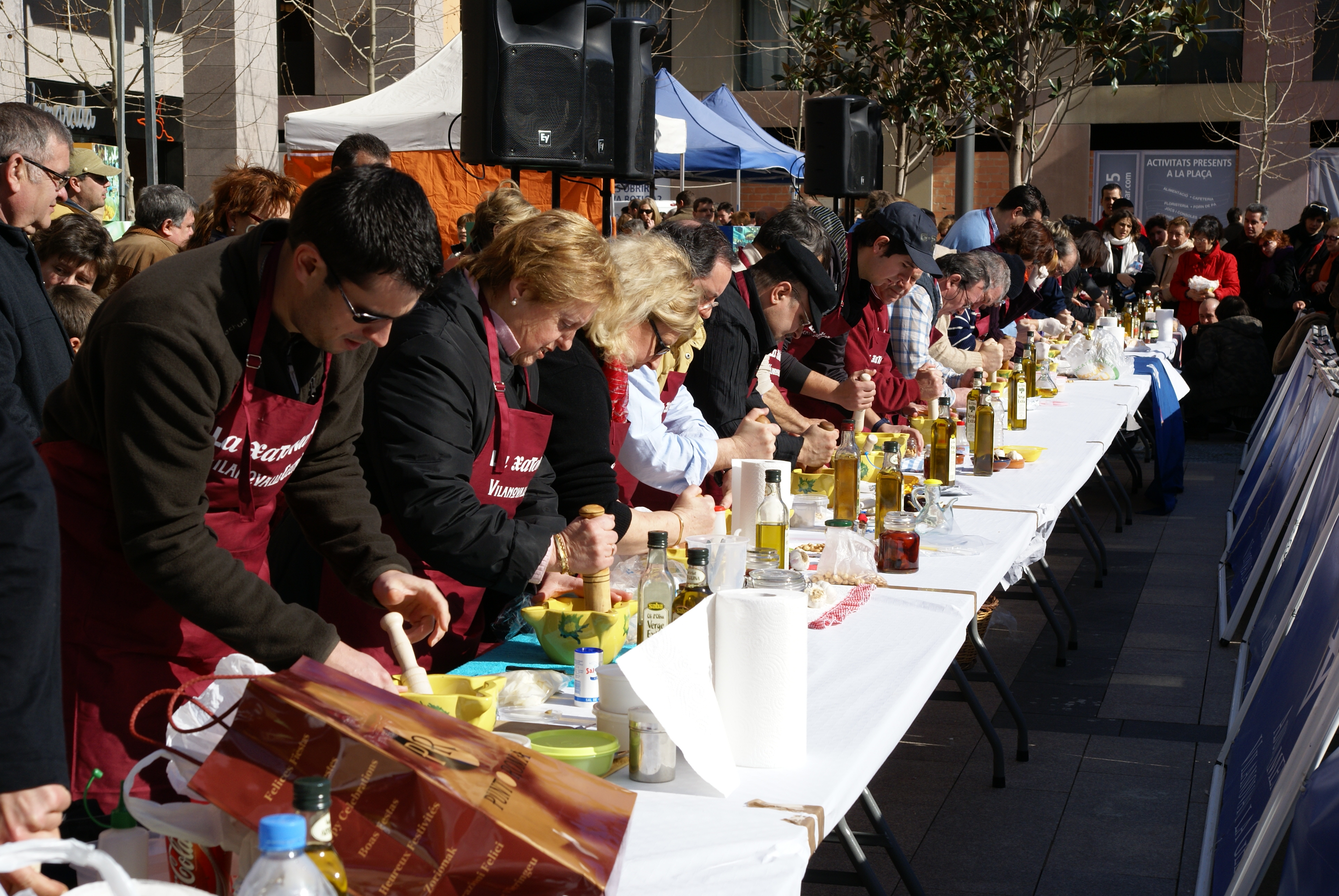 La tretzena edició del Concurs Nacional de Xató, que va comptar amb 27 participants (Vilanova i la Geltrú, Garraf, Catalunya)